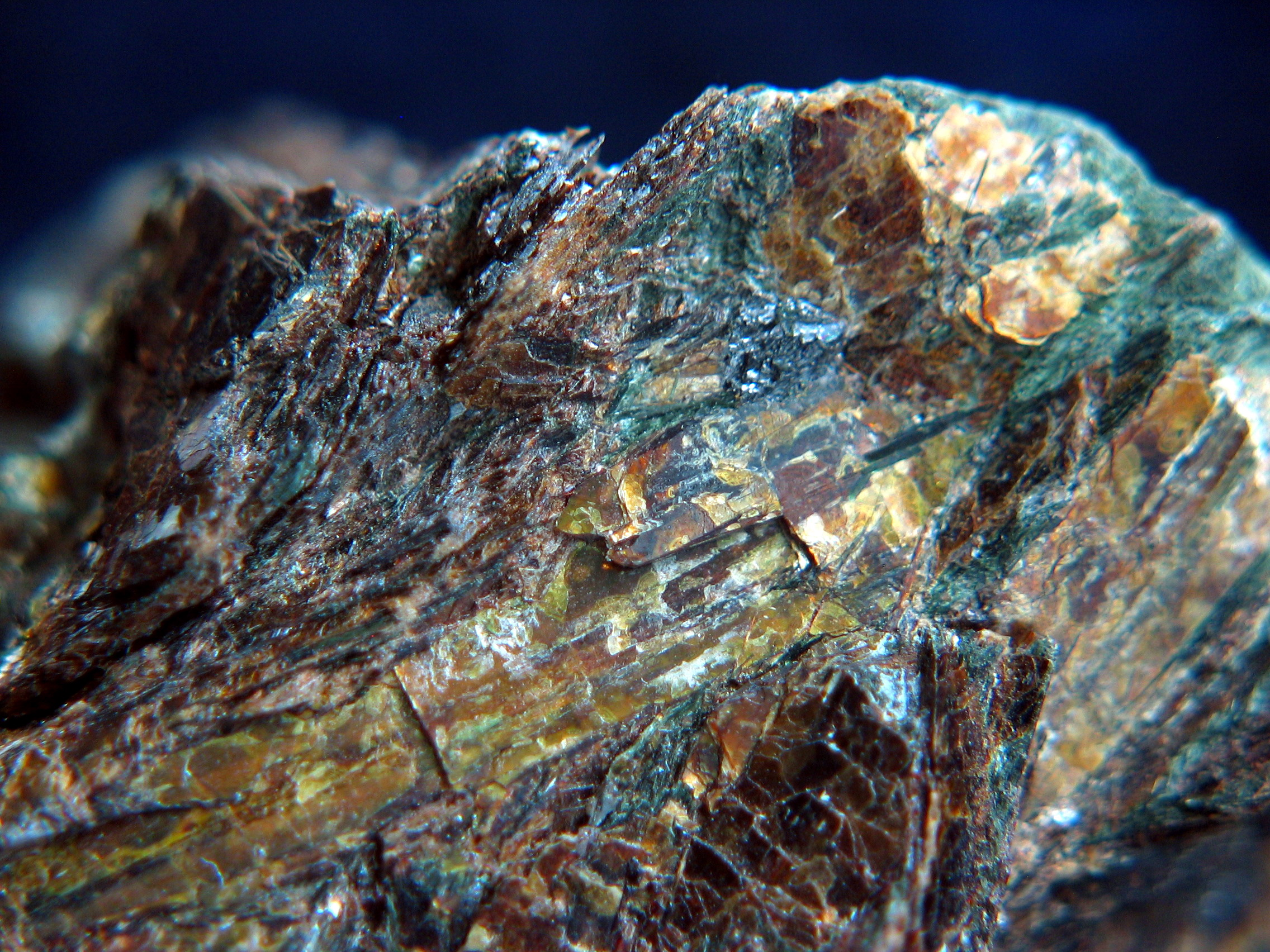 Astrofyllit - Półwysep Kolski (Chibiny). 2